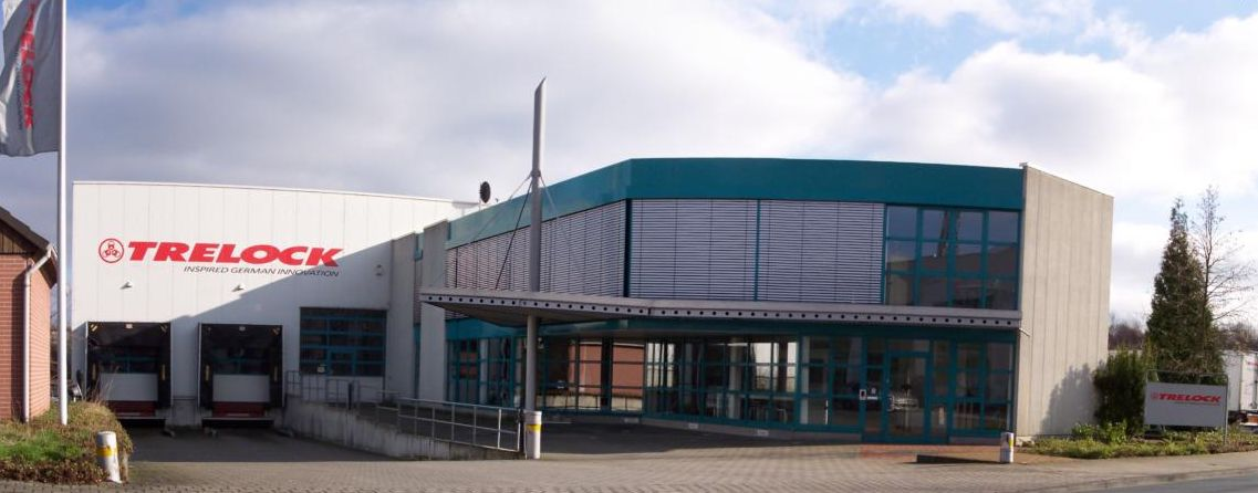 Trelock-Gebäude Münster